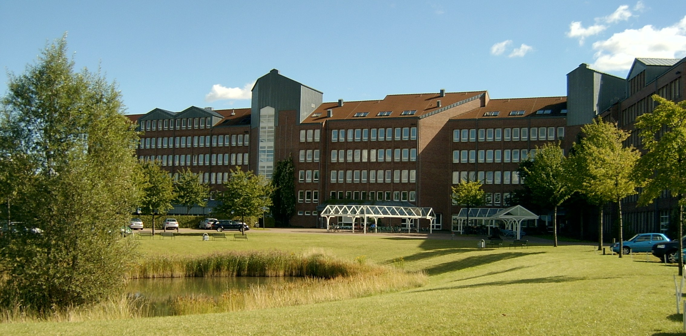 Verwaltungszentrum für Heilberufe in Magdeburg mit Sitz der Kassenärztlichen Vereinigung und der Ärztekammer Sachsen-Anhalt - Google Maps - Google Earth